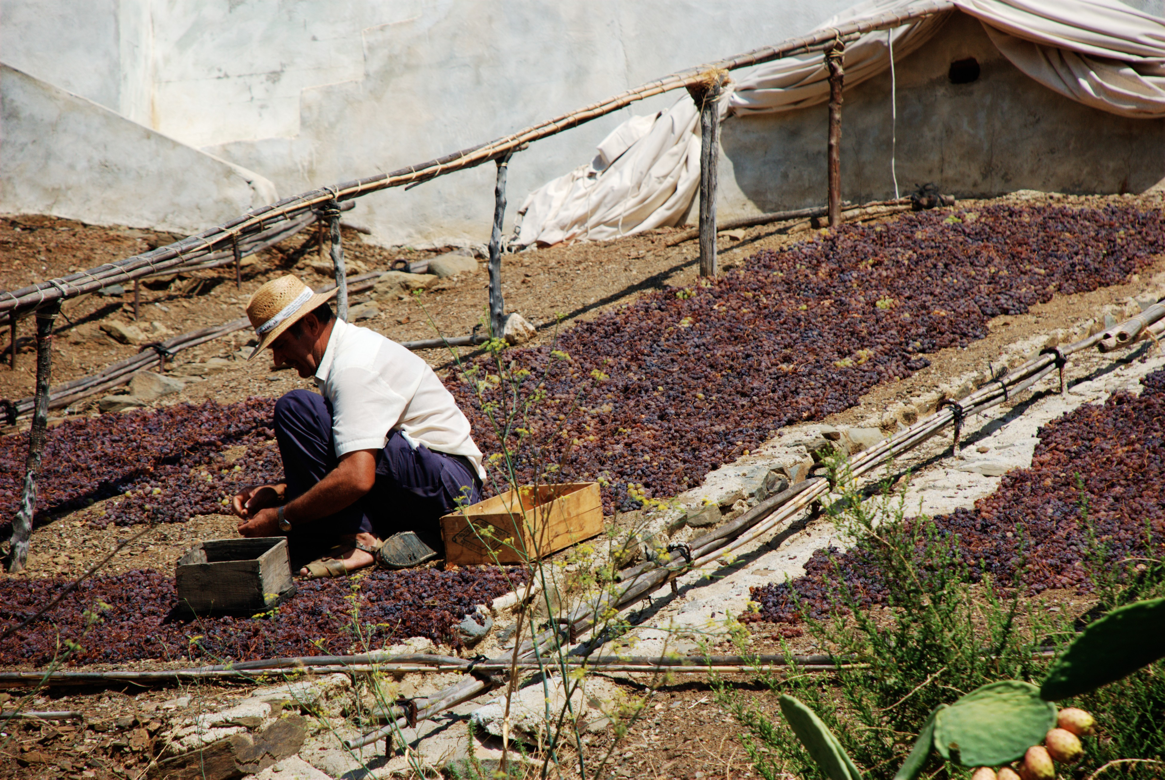 Recogida de "Pasas de Málaga", Andalucía, España.